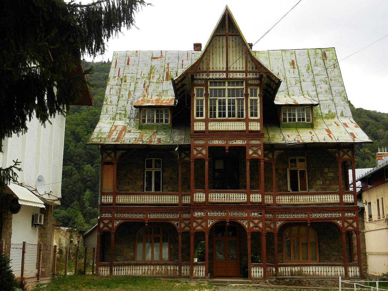 Casa George Ionescu